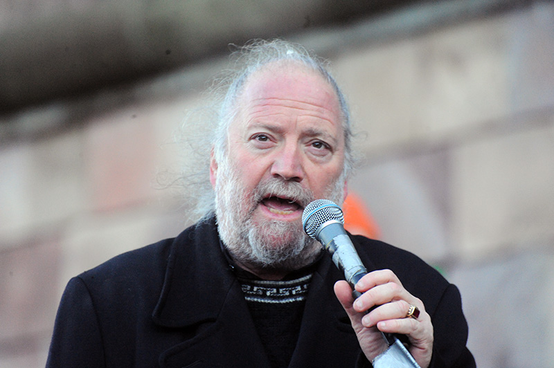 Dror Feiler